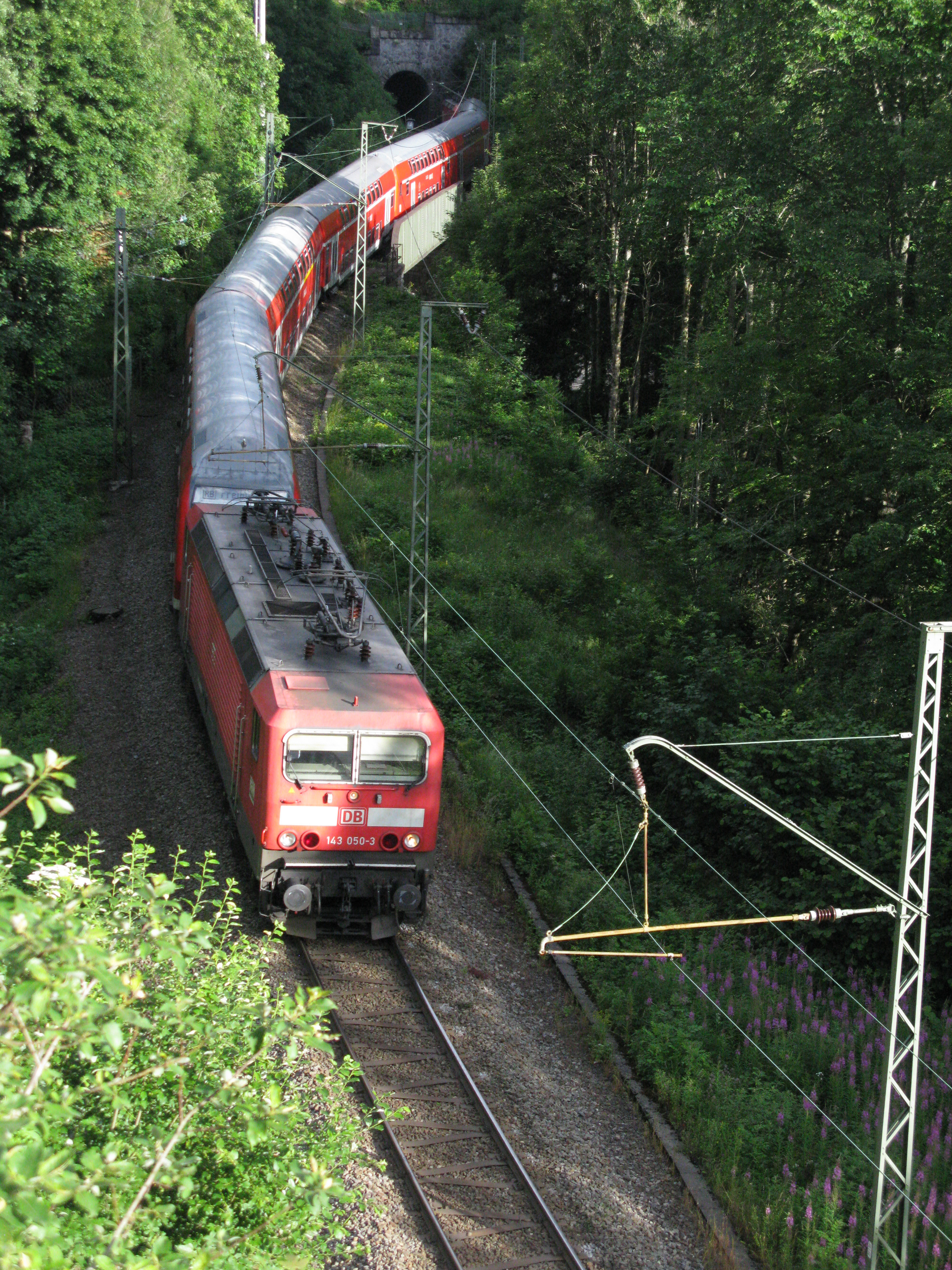 Höllentalbahn zwischen Ravenna-Tunnel und Finsterrank-Tunnel (Hintergrund)